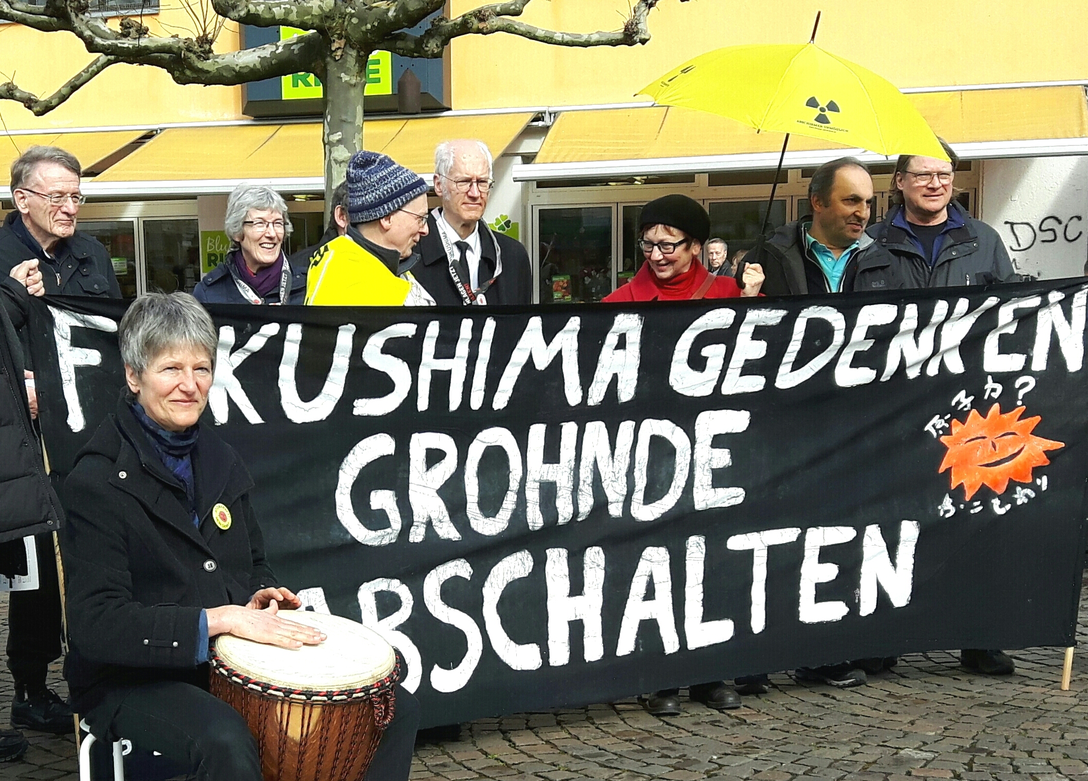 Winfried 'Eisenberg (oben links) auf der Mahnwache in Herford wegen der Jährung des Reaktorunfalles in Fukushima